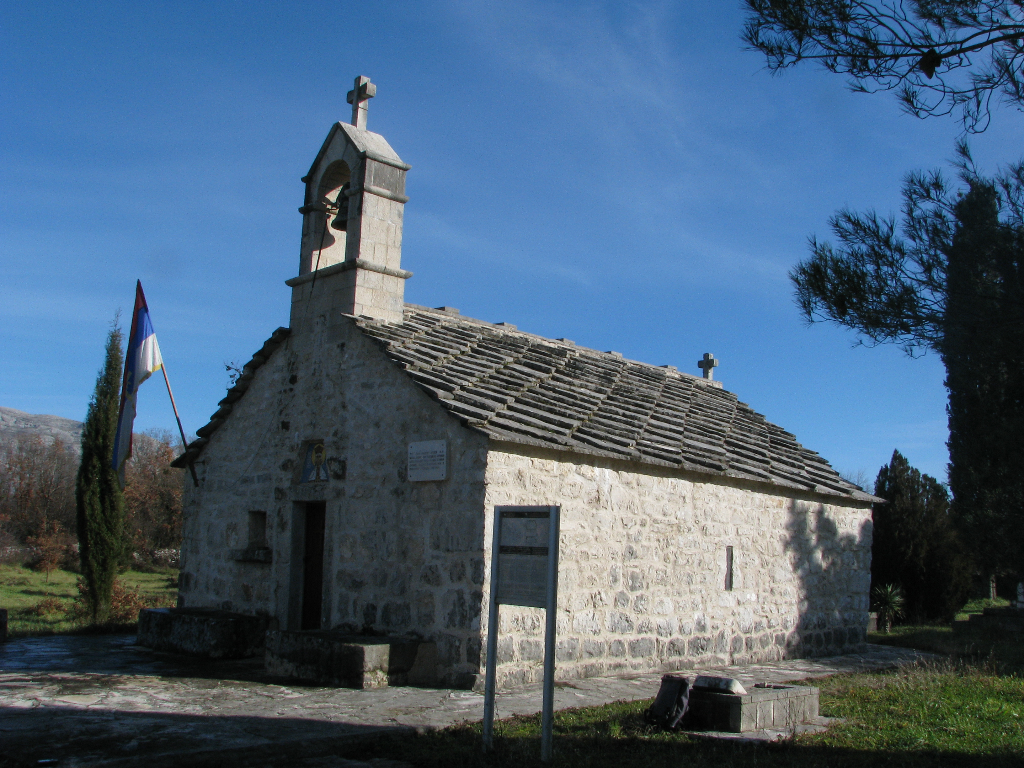 NKD 678, Crkva sv. Neđeljke (Nedelje), nekropola sa stećcima i ostaci praistorijskog naselja Taleža, u blizini Trebinja.